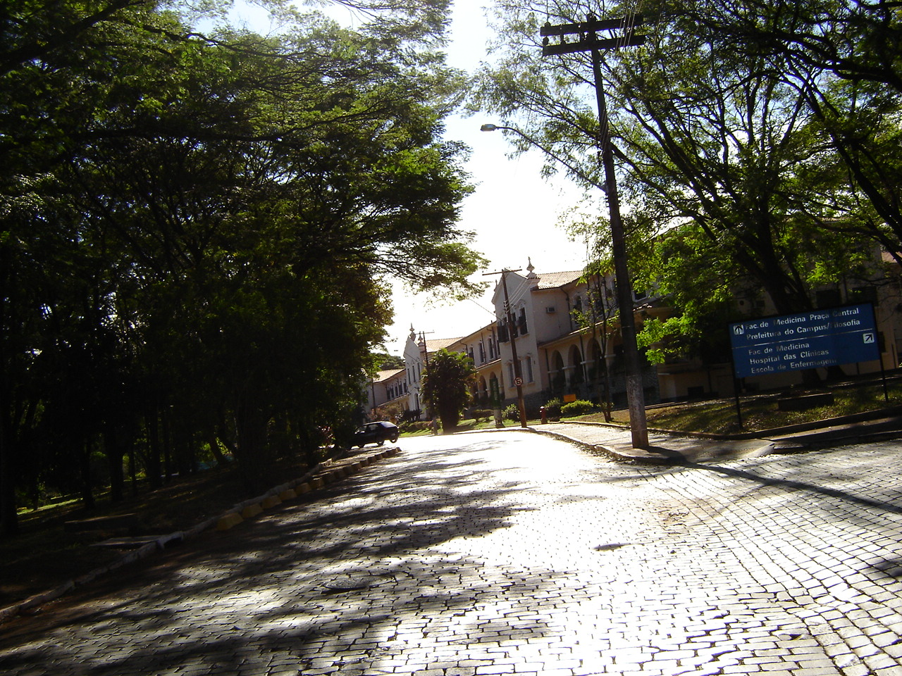 Dependências da Universidade do Estado de Santa Catarina (Udesc)